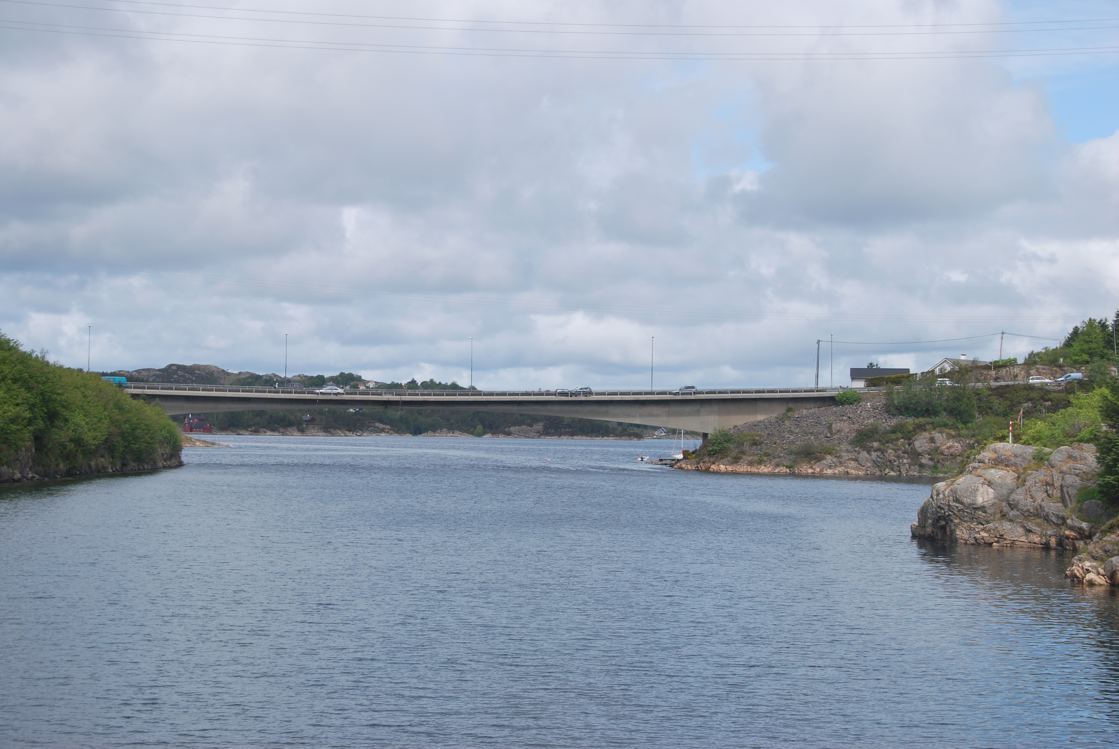 Straumsndet bru som forbinder Bildøy sammen med Straume